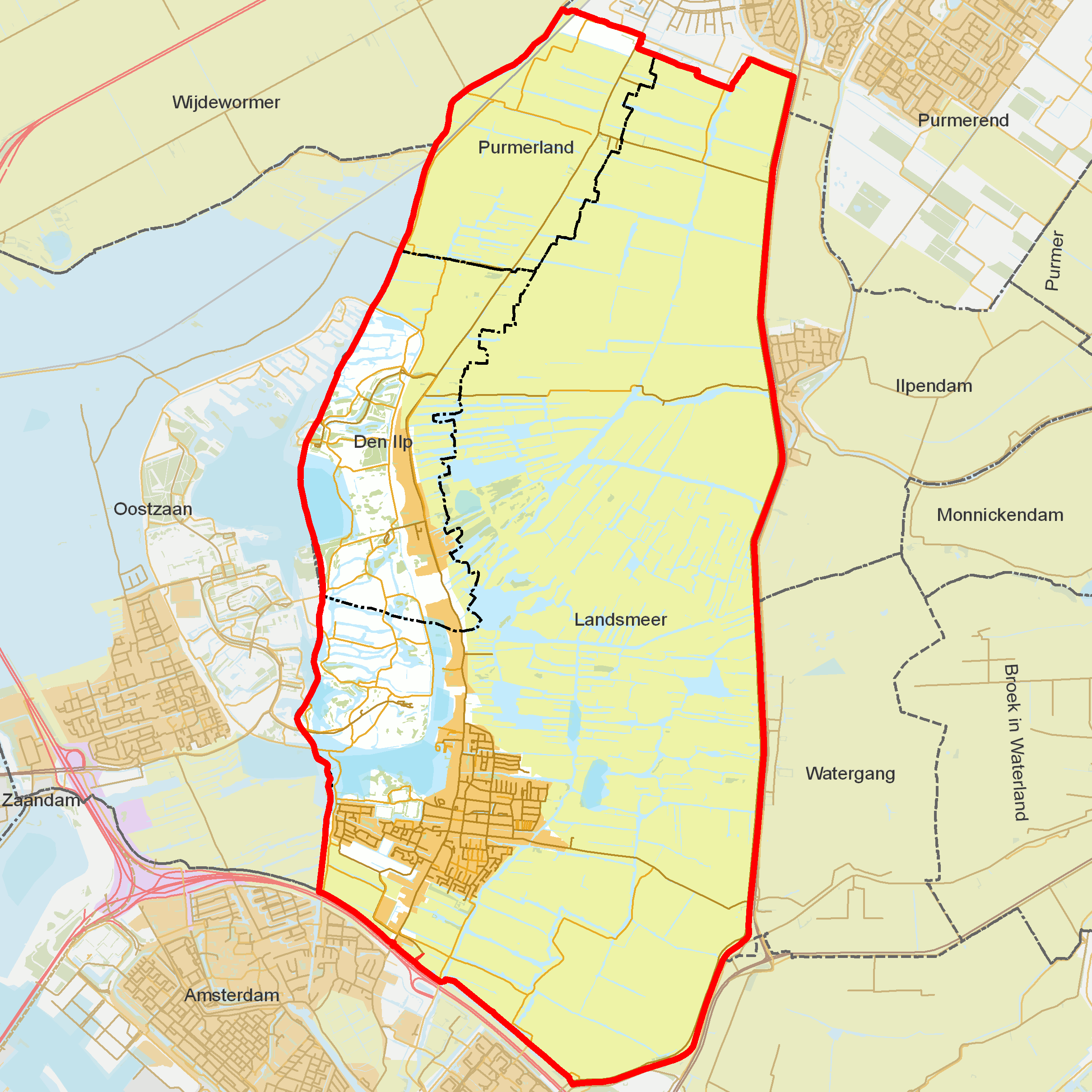 BAG woonplaatsen - Gemeente Landsmeer.png